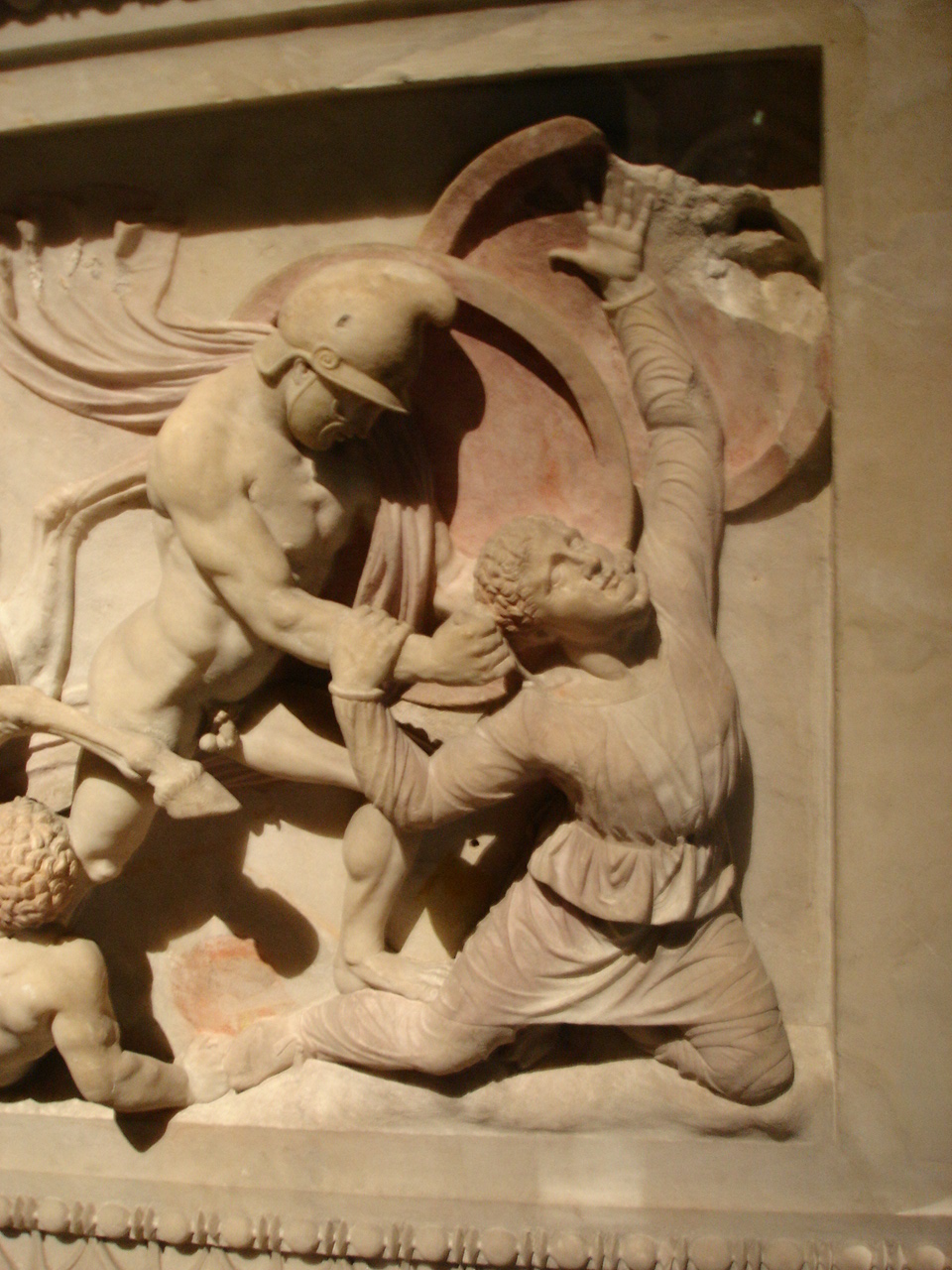 Istanbul - Museo archeologico - Sarcofago di Alessandro, sec. IV a.C. - Foto di: Giovanni Dall'Orto 28-5-2006. Scena di guerra.